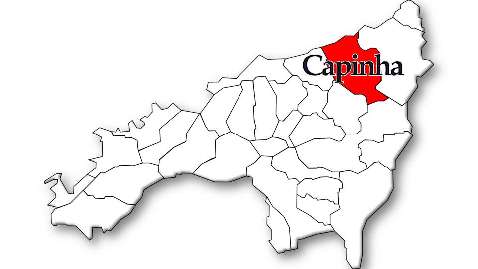 População